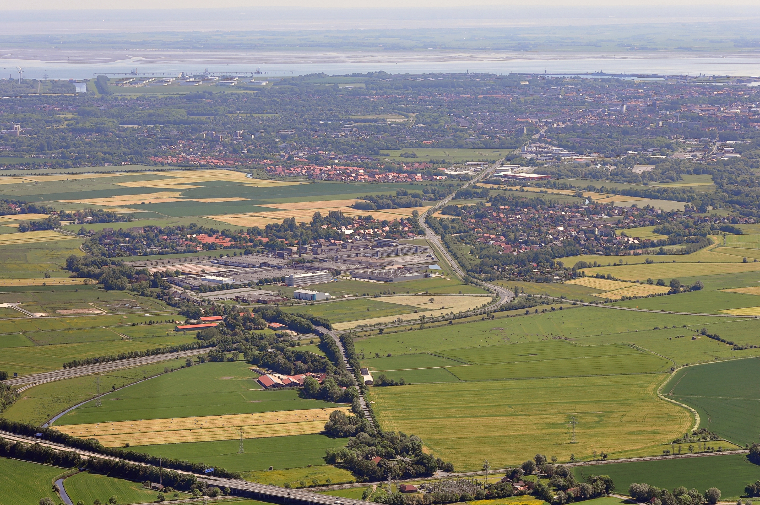 Luftbild von Roffhausen und Wilhelmshaven. Diagonal von links unten nach rechts oben durch das Bild läuft die Bundesstraße B210, die lokal Oldenburger Straße oder später Bismarckstraße heißt. Die Autobahn am unteren linken Bildrand ist die A29. Das Gewerbegebiet links der Straße ist das Gelände der ehemaligen Olympia-Werke. Der in der linken unteren Bildhälfte sowie in der Bildmitte vor dem Stadtteil Maadebogen erkennbare kleine Fluss ist die Maade. - Aus der Serie: Luftbilder von der Nordseeküste 2012-05